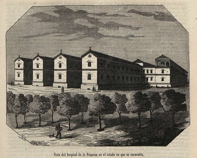 Vista del hospital de la Princesa, en la revista española Semanario Pintoresco Español.